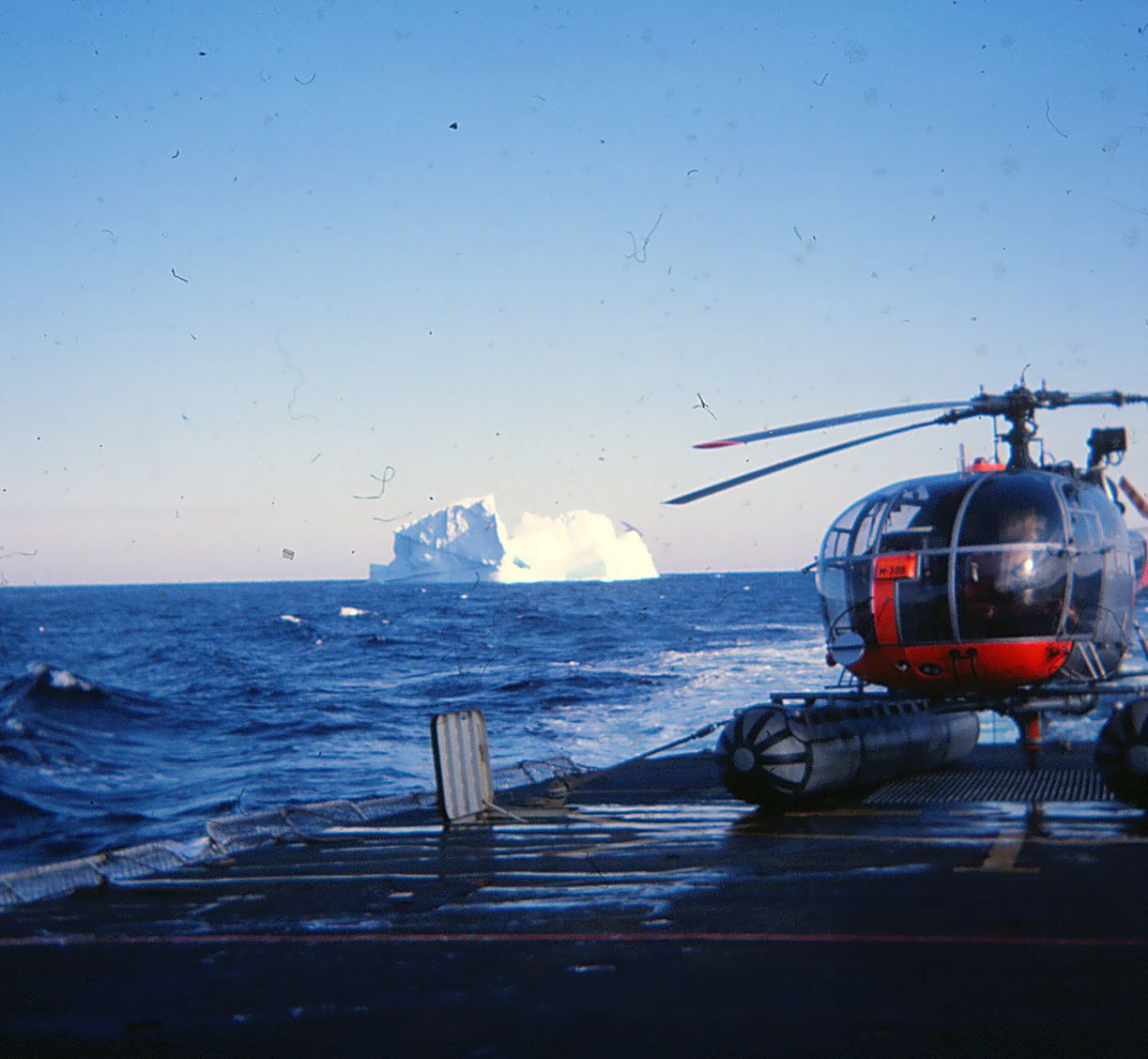 Alouette III på helikopterdækket af F340 Inspektionsskibet Beskytteren nær Grønland, april 1977.